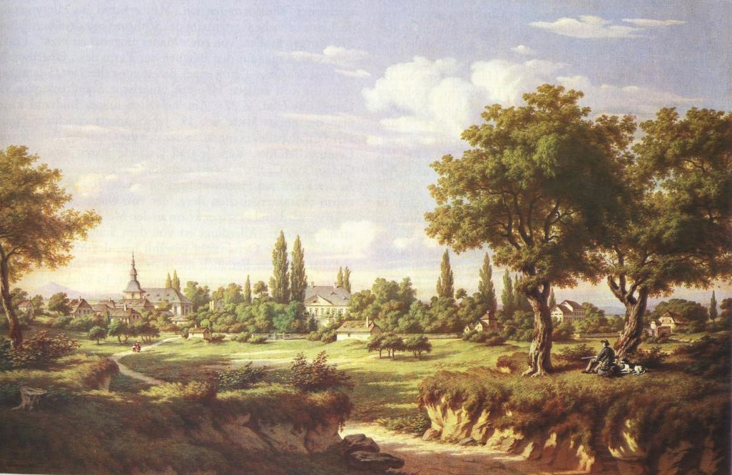 "Dirmstein in der Pfalz und das von Camuzische Schloß"